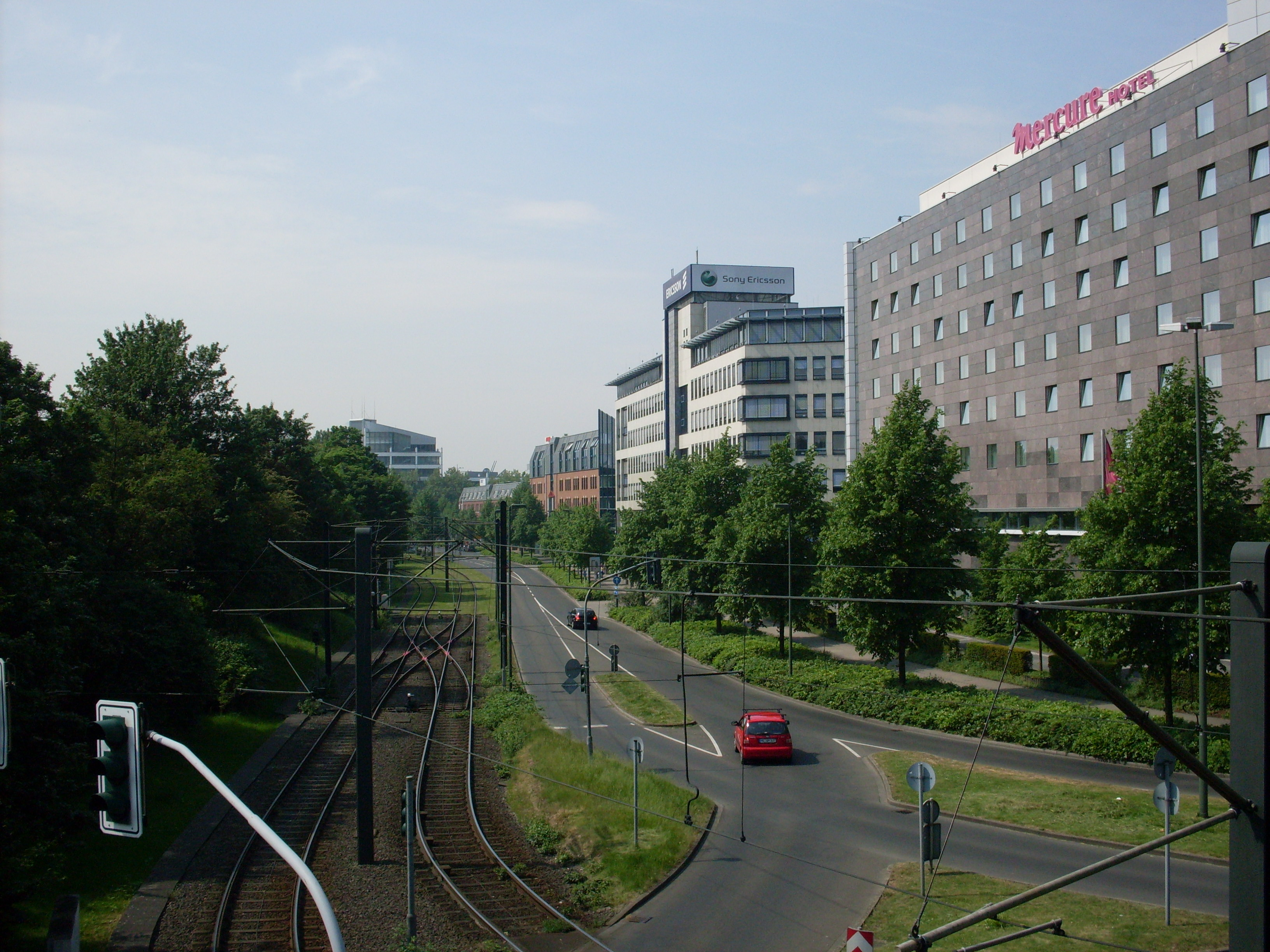 Düsseldorf-Lörick, Bürostadt "Seestern"